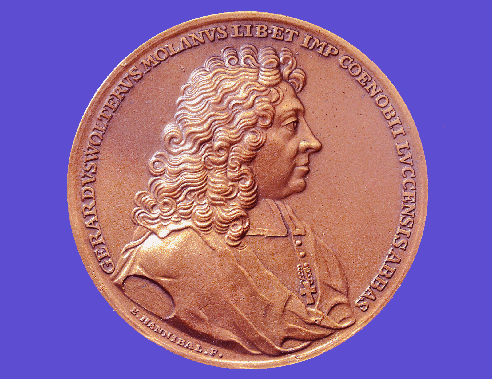 Porträt-Seite der Sterbemedaille auf den Tod des Gerhard Wolter Molanus (1633-1722), 1722 geschaffen von dem Medailleur Ehrenreich Hannibal an der Clausthaler Münze. Das hier zu sehende Modell ist eine Replik im Niedersächsisches Münzkabinett für die Norddeutsche Landesbank (NORD/LB) von dem um die Jahrtausendwende in Meersburg tätigen Medailleur Harry Maximilian Buchberger.